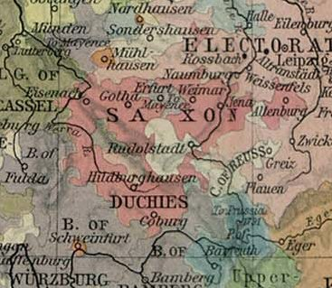 Ernestijnse hertogdommen in 1786 - vrij te gebruiken voor educatieve doeleinden